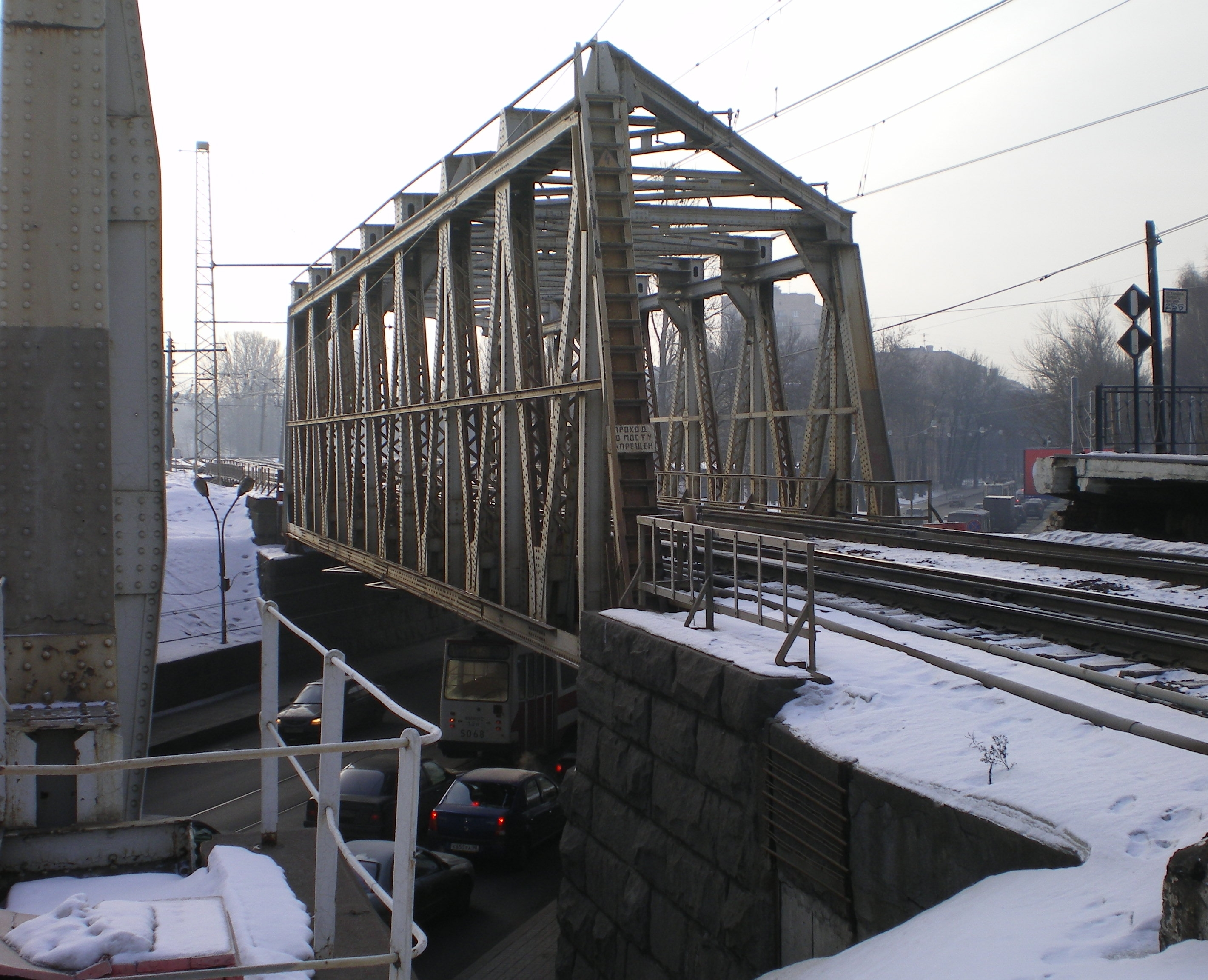 Переход через Большой Сампсоньевский перегона Финлянский-Ланская